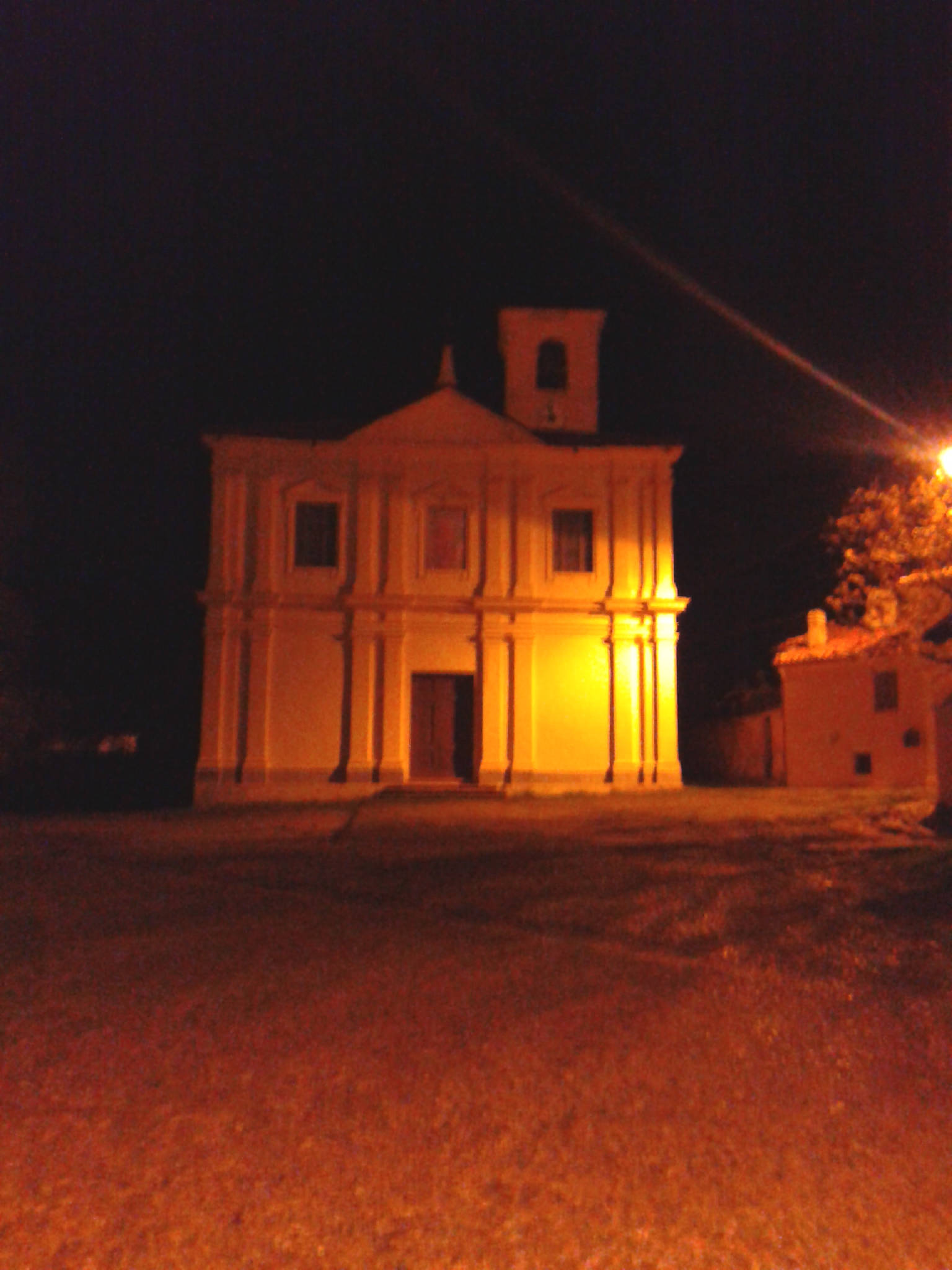 Chiesa S. Maria delle Grazie di Almese in notturna